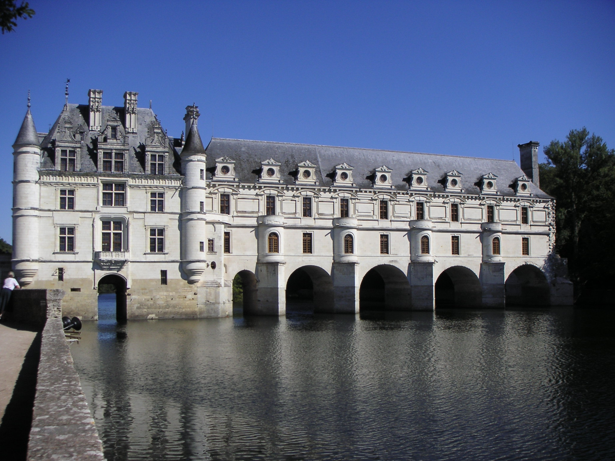 Vue du château de chenonceau du jardin de Catherine de Médicis